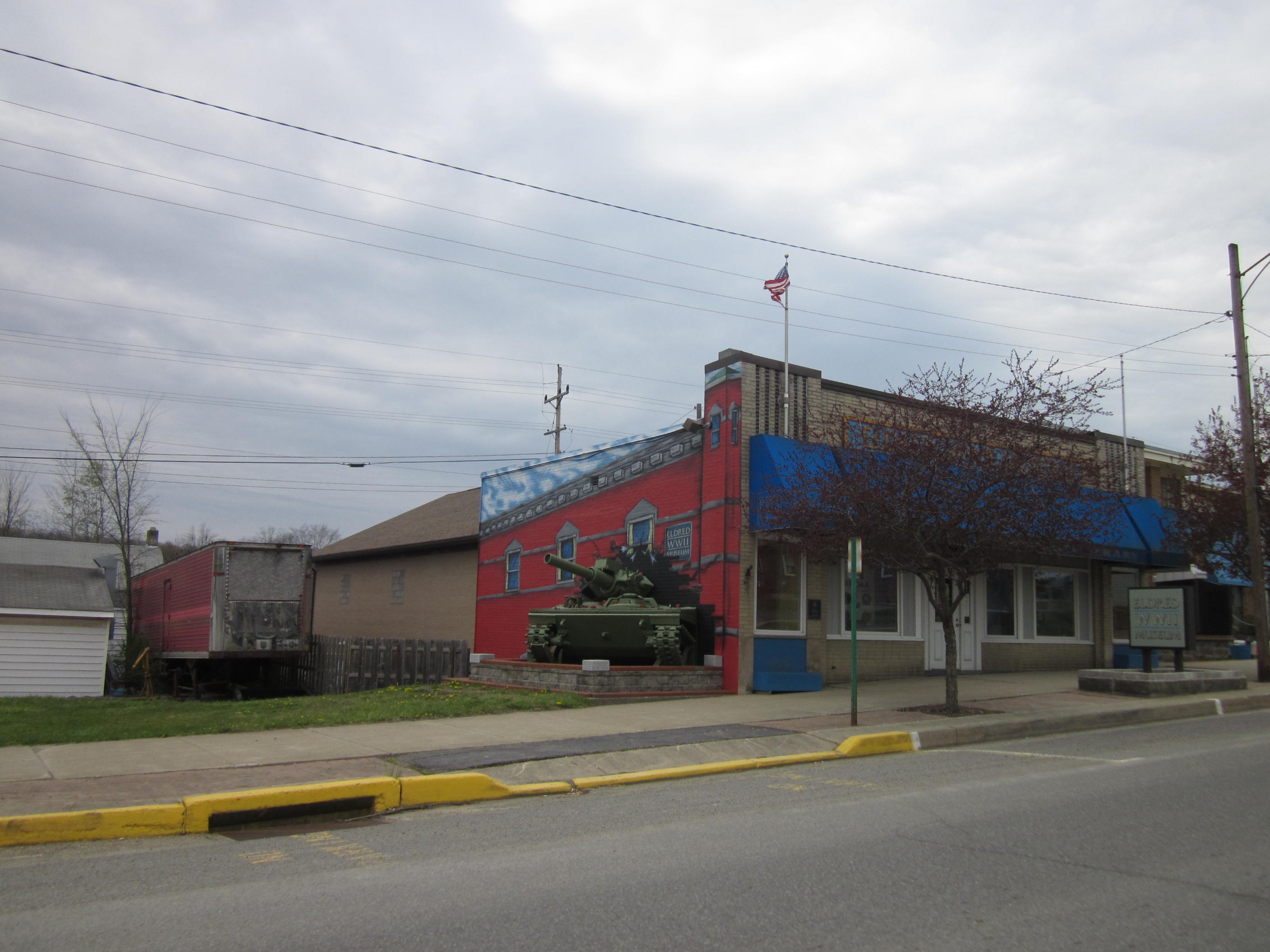 Eldred, Pennsylvania